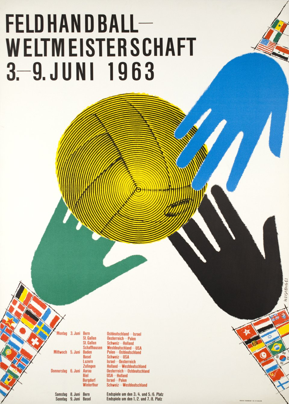 Plakat der Feldhandball-Weltmeisterschaft der Herren 1963